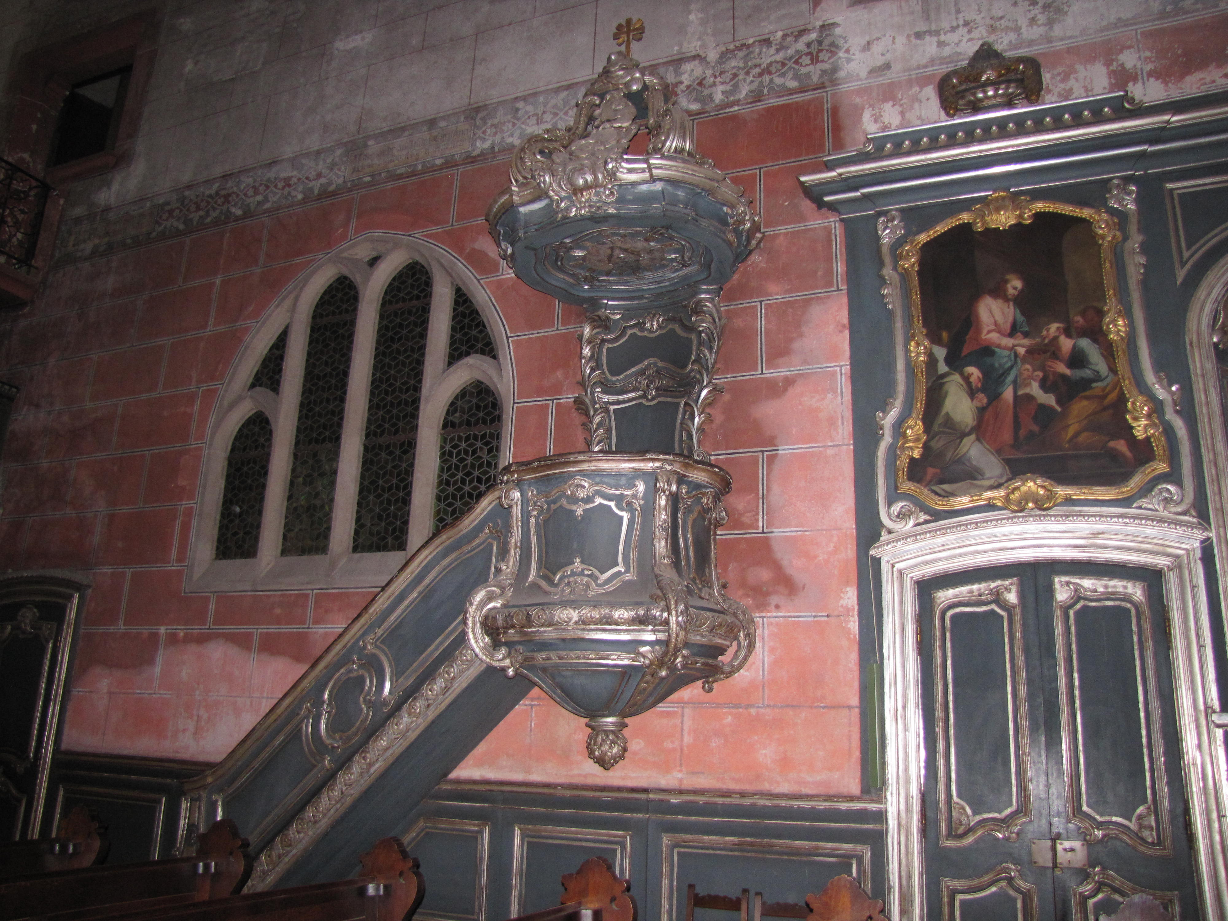 Alsace, Bas-Rhin, Église protestante Saint-Pierre-le-Jeune de Strasbourg (PA00085030): Ancien chœur catholique (église simultanée). Chaire à prêcher baroque (1765)